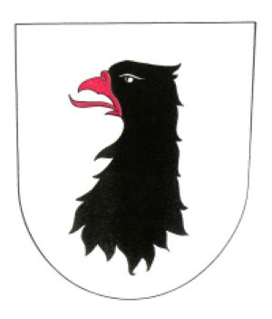 Znak obce Čechočovice.